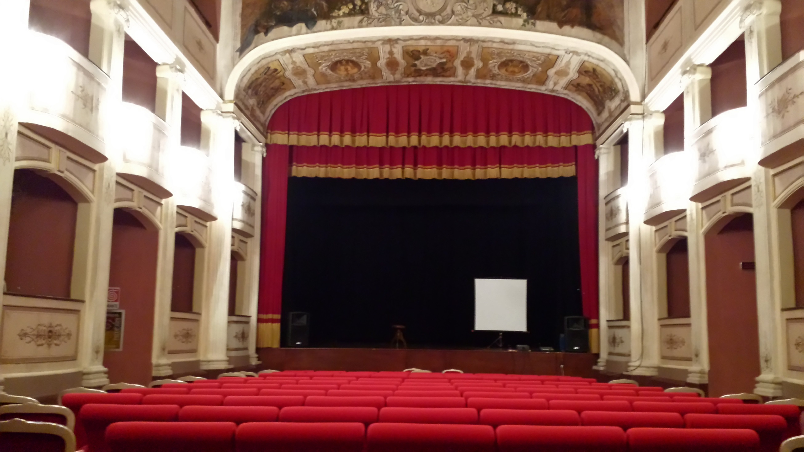 Vista del palcoscenico e dei loggioni laterali del Teatro Comunale di Novoli